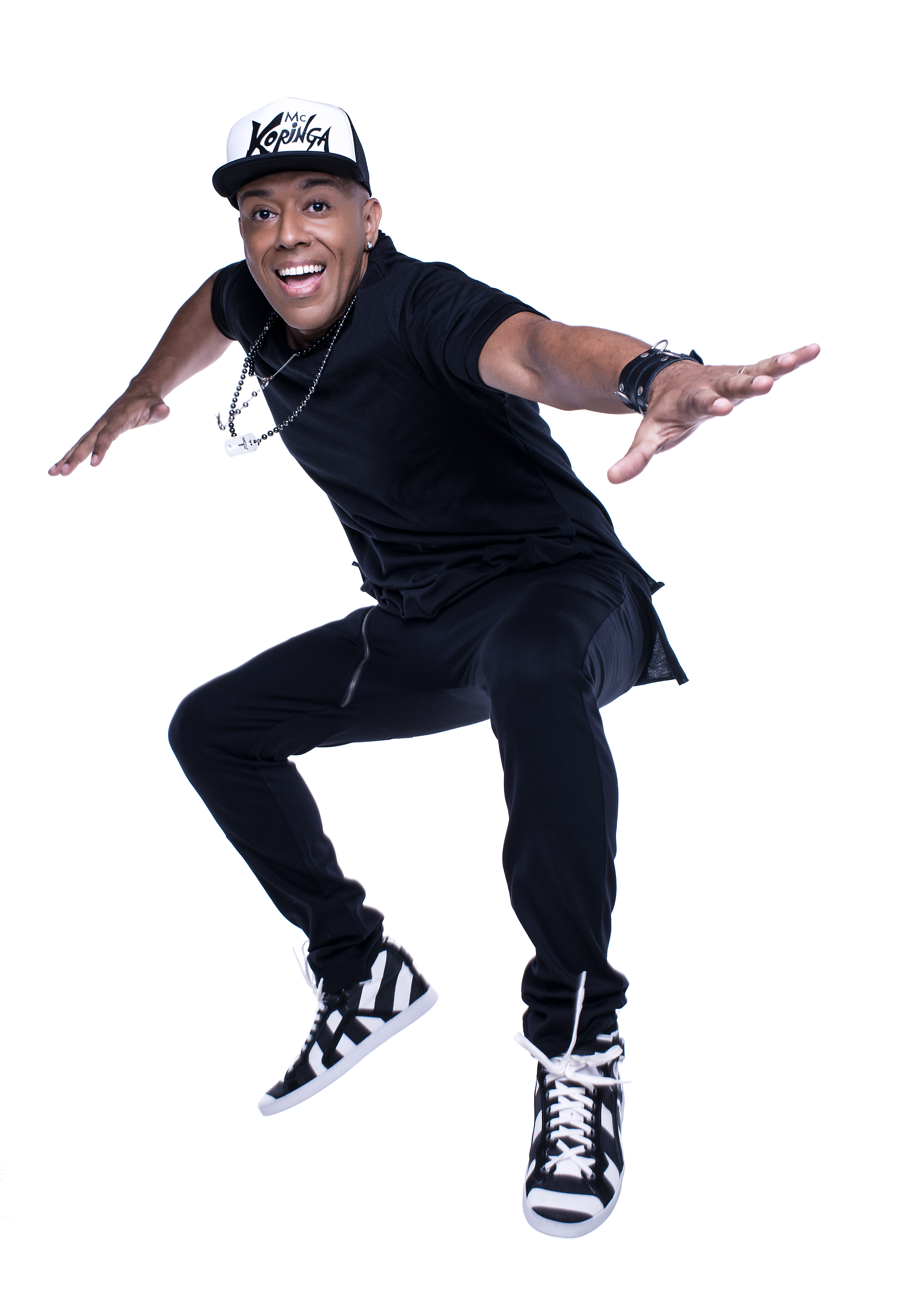 Mc Koringa Pulo